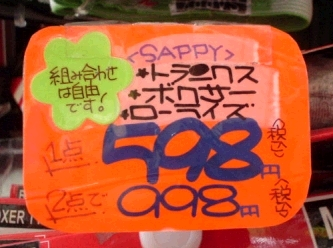 セット値引き